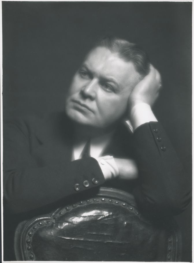 Emilio Sommariva (1883-1956) Ritratto del poeta Francesco Pastonchi (1922-1927)